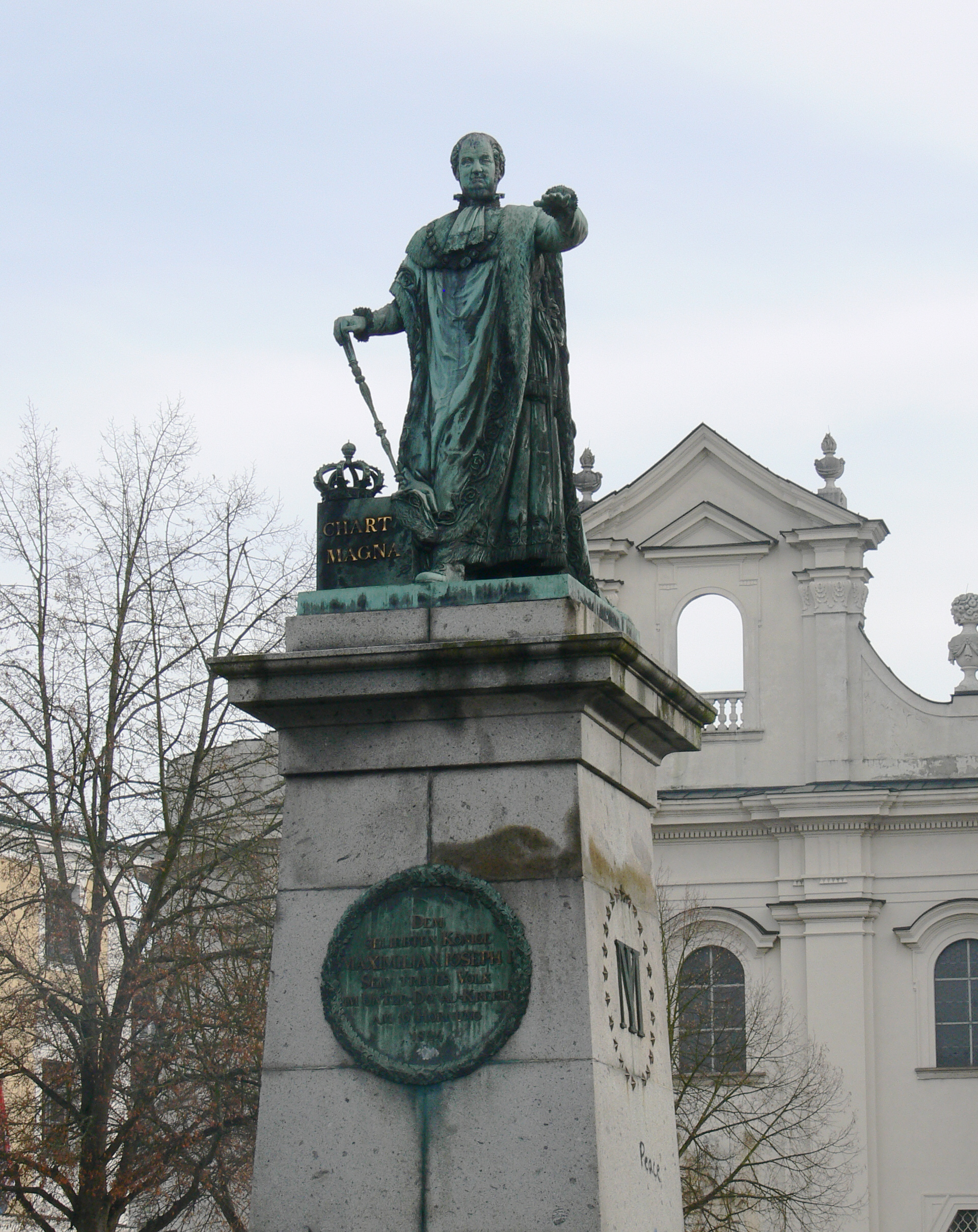 Passau, Domplatz, Denkmal für König Max I. Joseph (sog. „Regenprüfer“), 1824–1828, Entwurf angeblich von Karl Eichler, modelliert von Christian Jorhan dem Jüngeren, gegossen von Karl Samassa